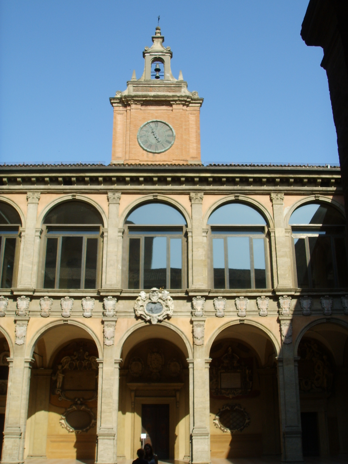 Il cortile dell'Archiginnasio a Bologna.